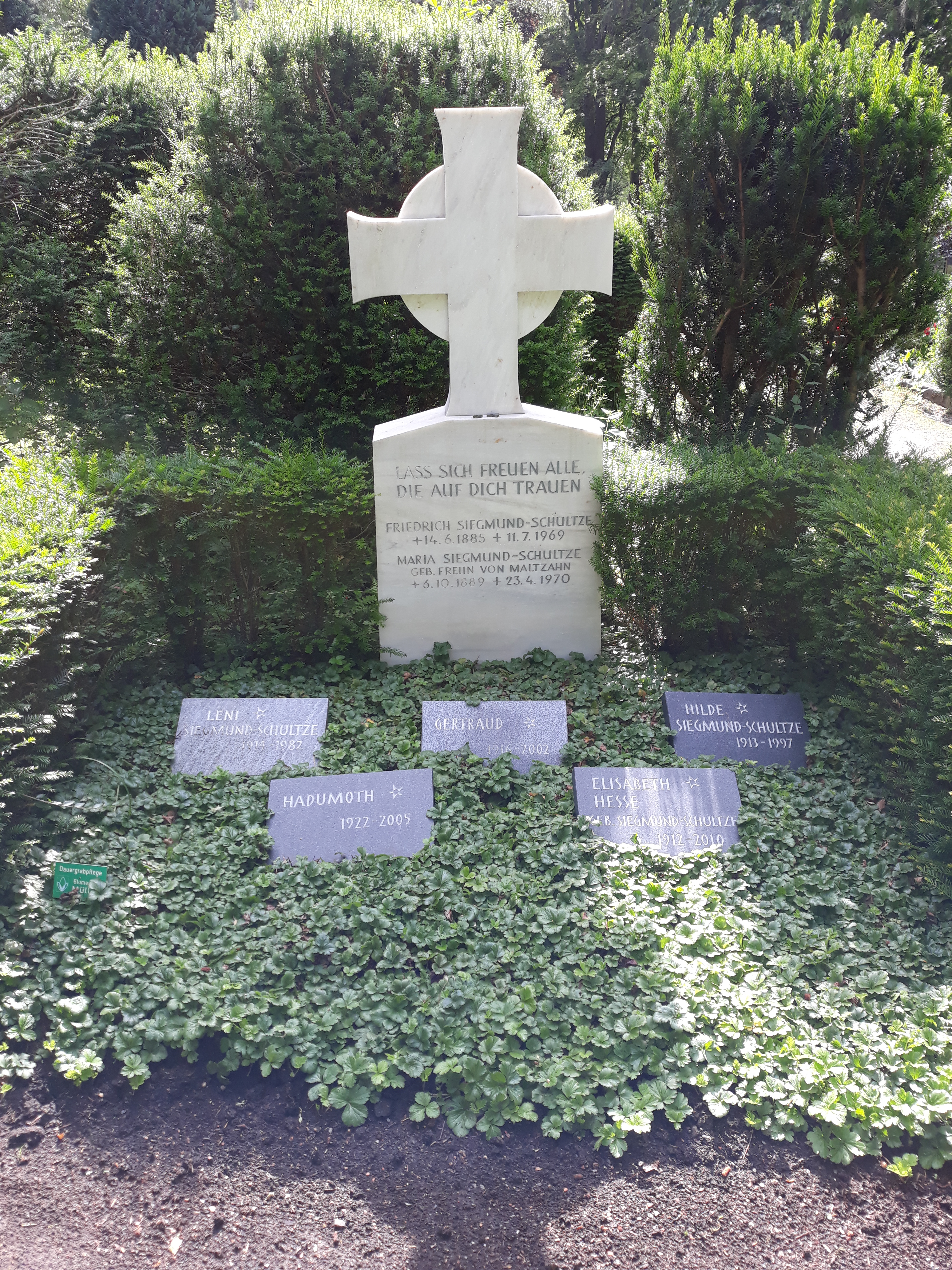 Das Grab des deutschen Theologen und Pazifisten Friedrich Siegmund-Schultze und seiner Frau Maria im Familiengrab auf dem Osthofenfriedhof Soest.